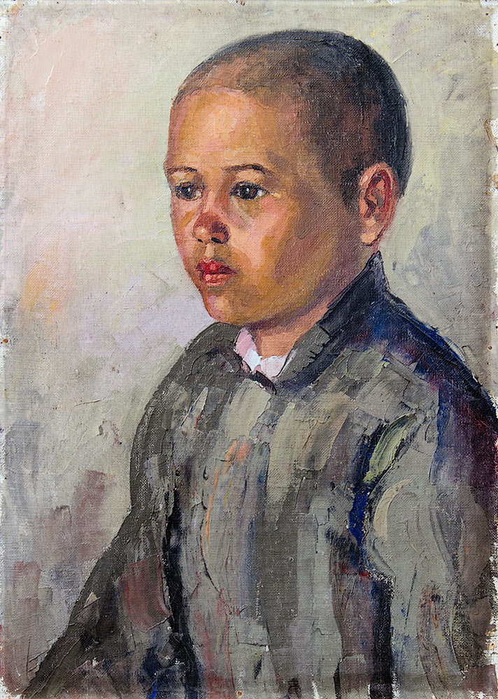 Картины Юлия Юльевича Блюменталч (1870—1944) — русского, советского живописеца, графика, одного из основоположников башкирского профессионального изобразительного искусства. Башкирский мальчик